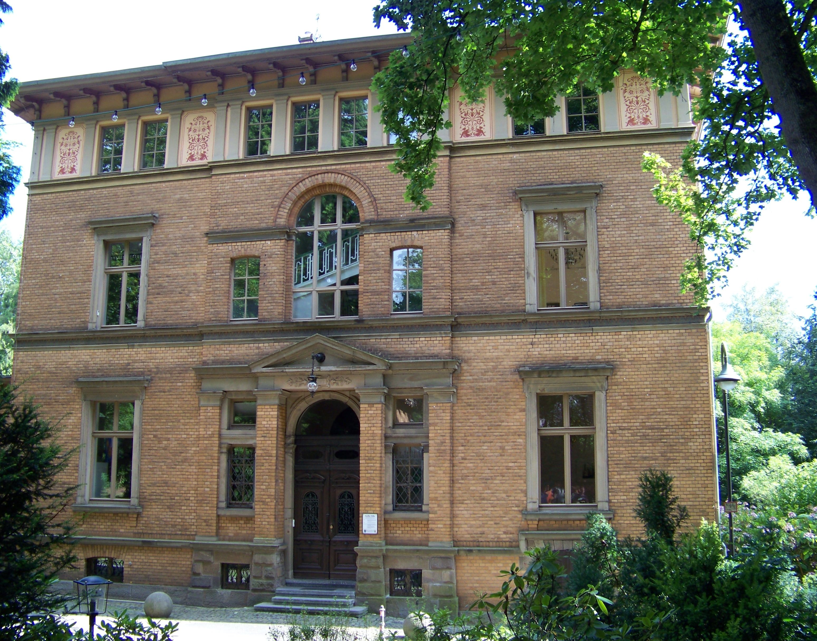 Denkmalgeschützte Gelbe Villa in Kreuztal (Germany)